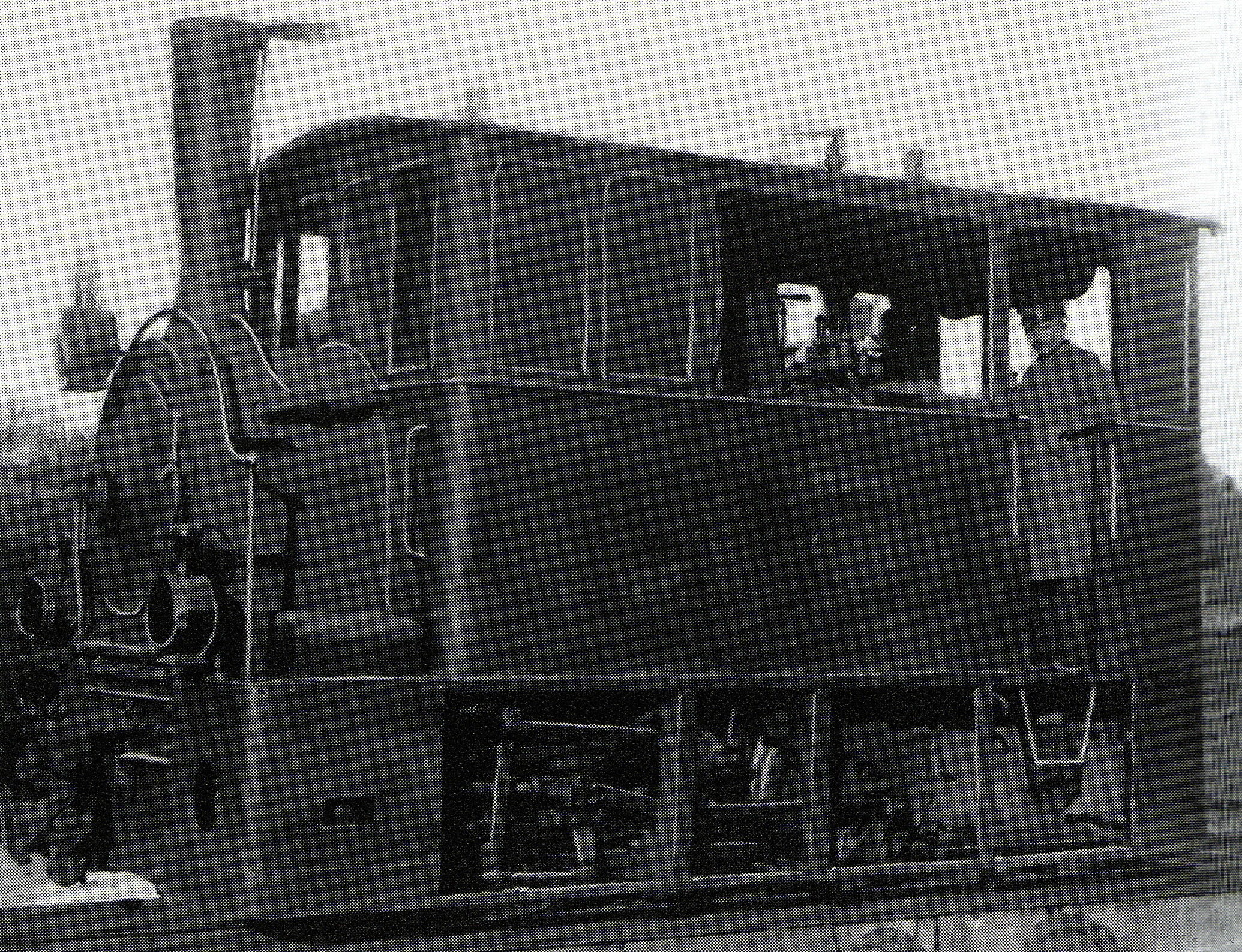 Zahnradlokomotive (System Riggenbach) HG 2 Nr. 4 Colombier der Neuenburg-Cortaillod-Boudry-Bahn, gebaut 1894 von Arnold Jung, Jungenthal bei Kirchen an der Sieg (Fabr.-Nr. 203), 1898 mit neuem Kessel aus der Schweizerischen Lokomotiv- und Maschinen-Fabrik Winterthur versehen, Zahnrad entfernt; 1901 als G 2/2 Nr. 4 an die Chemins de fer électriques de la Gruyère verkauft, 1908 als Baulok für die Strecke Monthey—Champéry vermietet; 1929 abgebrochen.